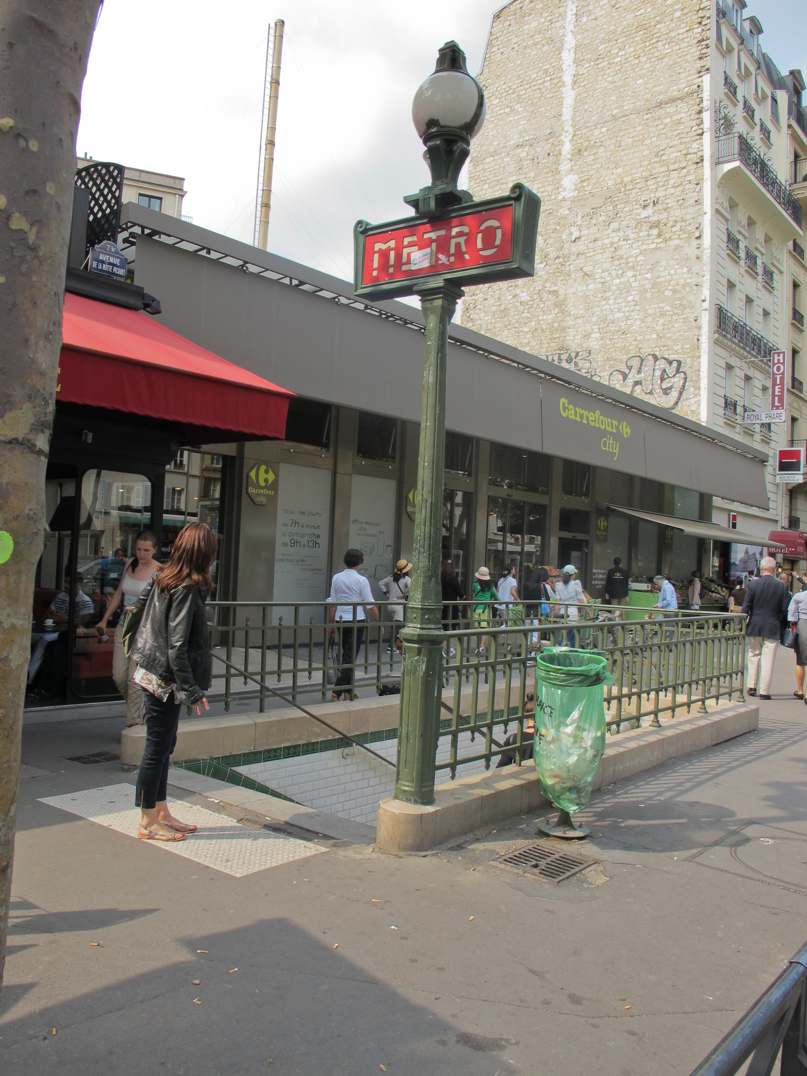 Station de métro École Militaire (Paris Metro), métro de Paris, France